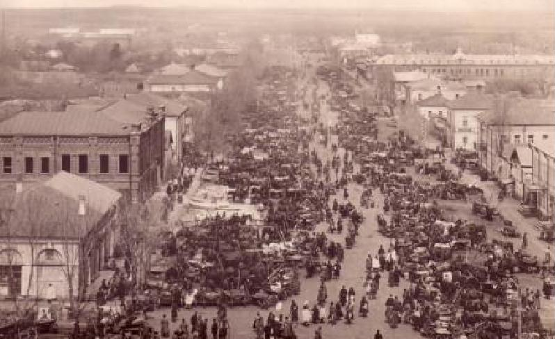 Усмань